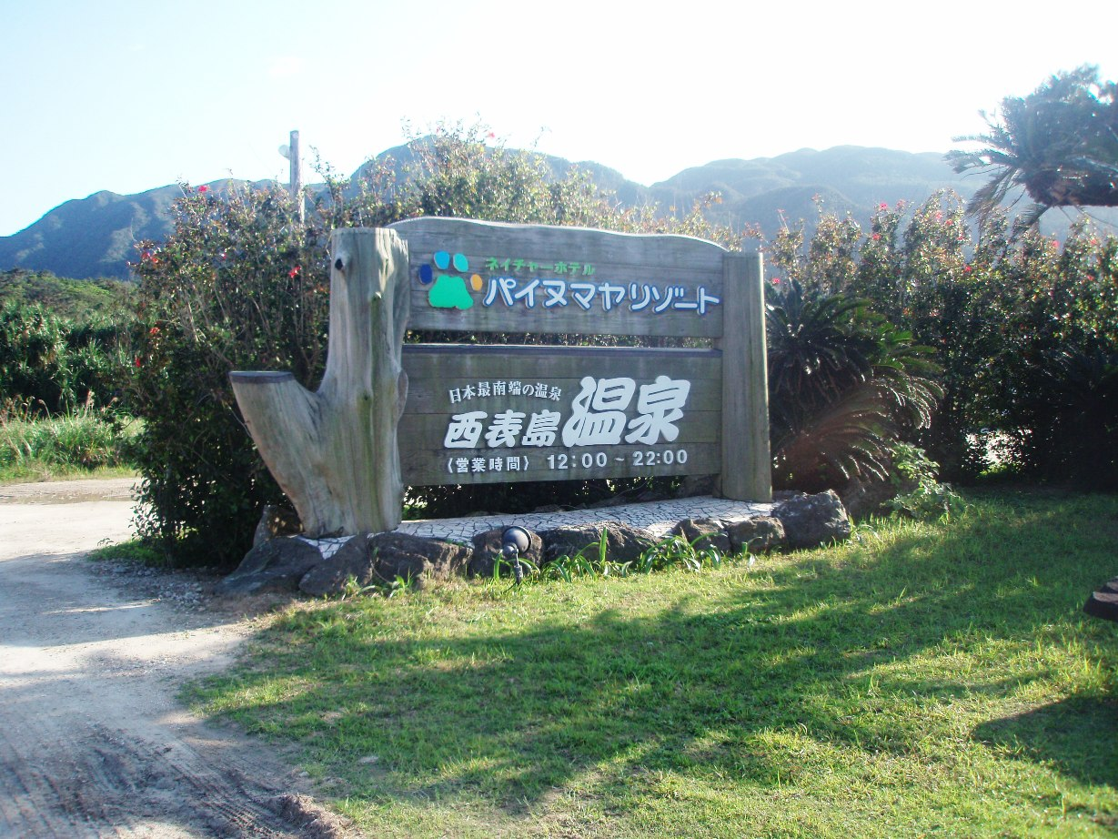 西表島温泉看板